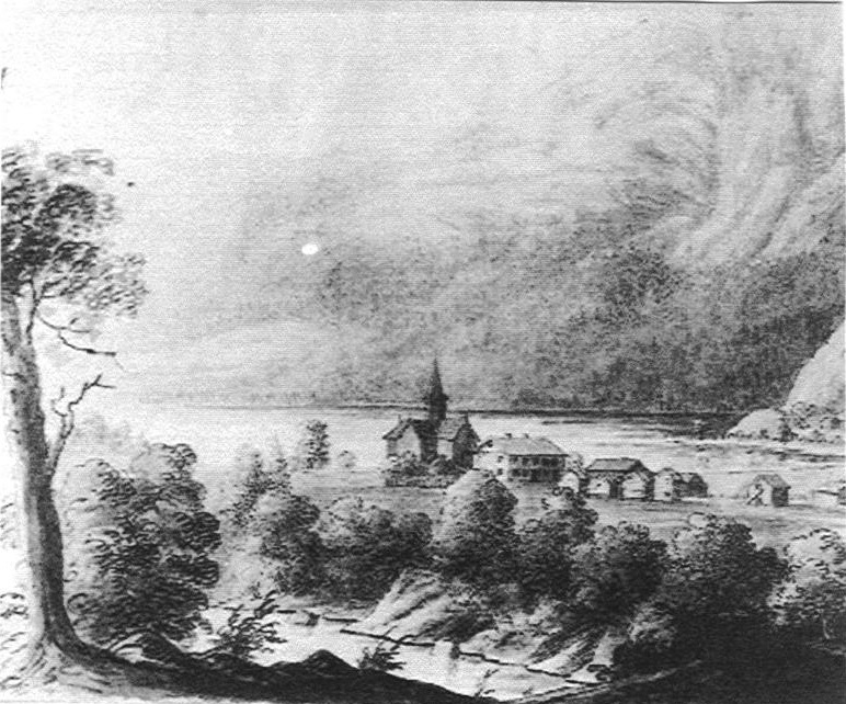 Moland kirke og prestegård